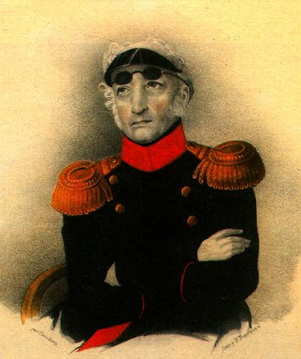 Граф Его́р Фра́нцевич (Георг Людвиг) Канкри́н (27 ноября 1774 — 10 сентября 1845)-писатель и государственный деятель.